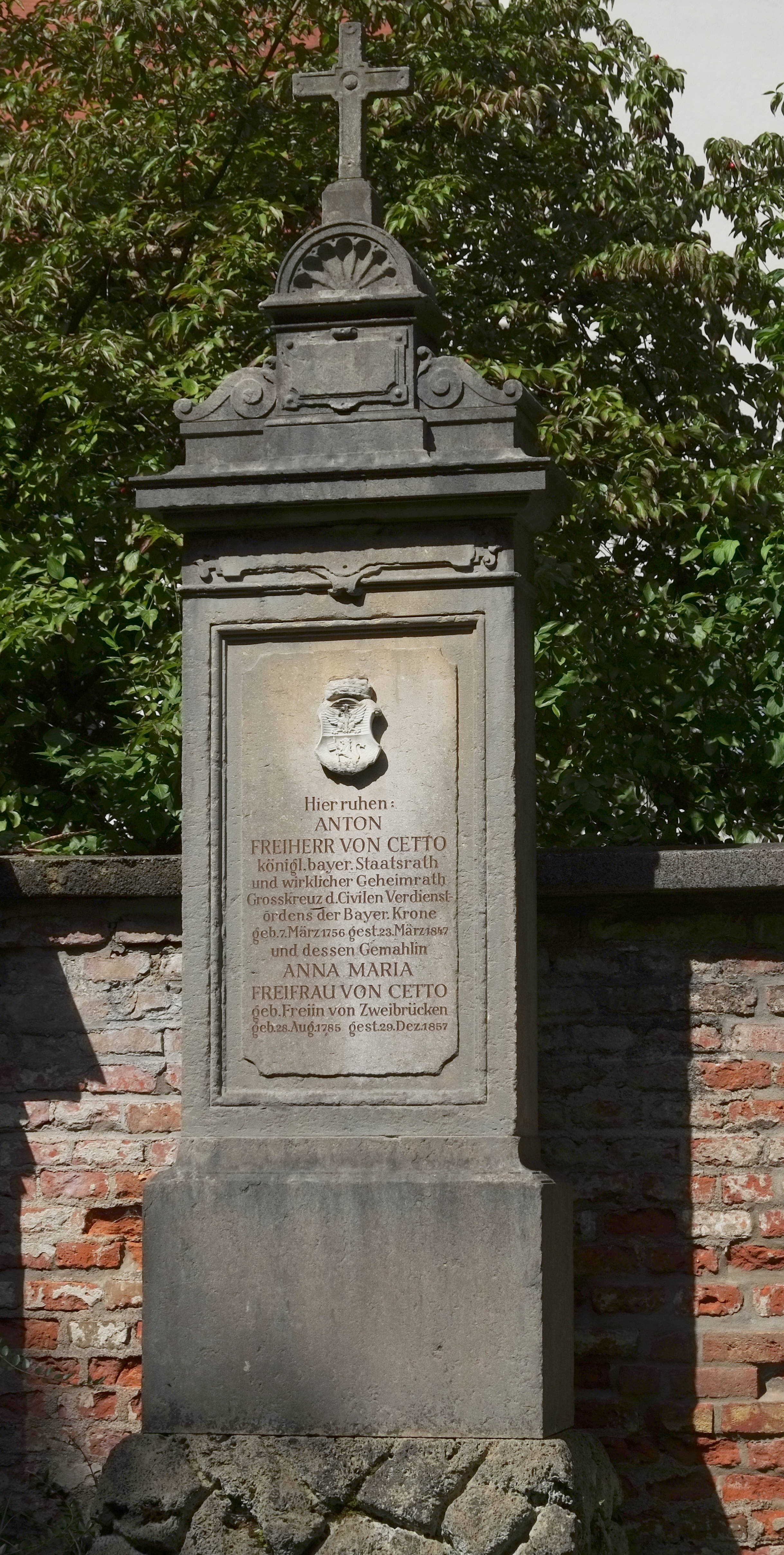 Grabstein für die Anton von Cetto und seine Frau Anna Maria Freifrau von Cetto auf dem Alten Südfriedhof in München (Bayern, Deutschland)